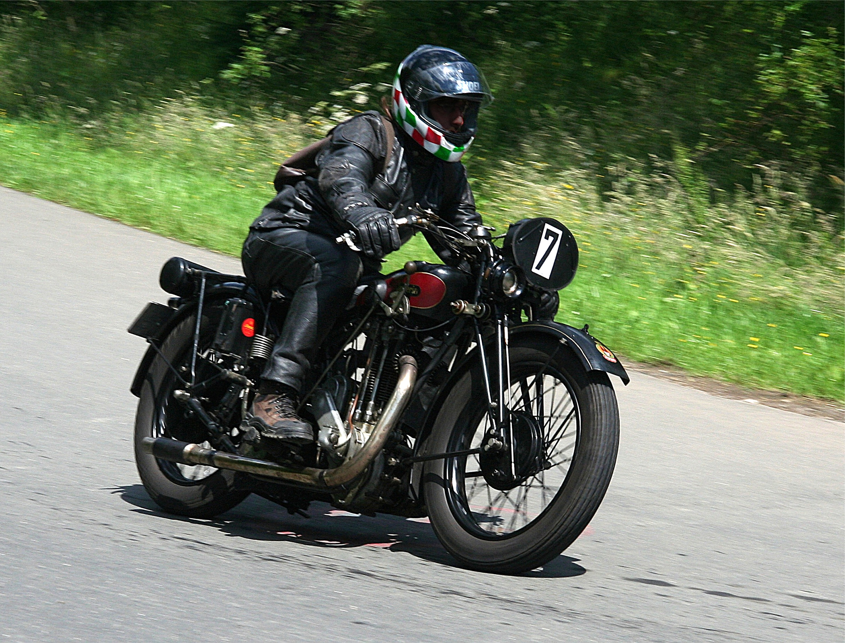 Imperia 500 H Sport, Baujahr 1929, auf der Südschleife des Nürburgrings